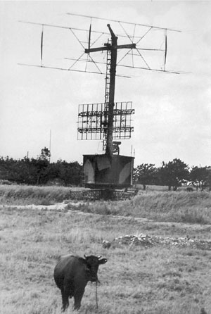 FuMG.41, "Freya Köthen", Stützpunkt Seehund Aufgenommen in Dänemark, Skelby Jüdland